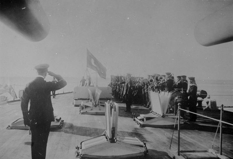 Kreuzer "Goeben" unter türkischer Flagge Großer Kreuzer Goeben; Stapellauf 8.3.1911; Schiff führt ab September 1914 die osmanische Flagge [Kreuzer Goeben unter osmanischer Flagge als "Yavuz Sultan Selim"]